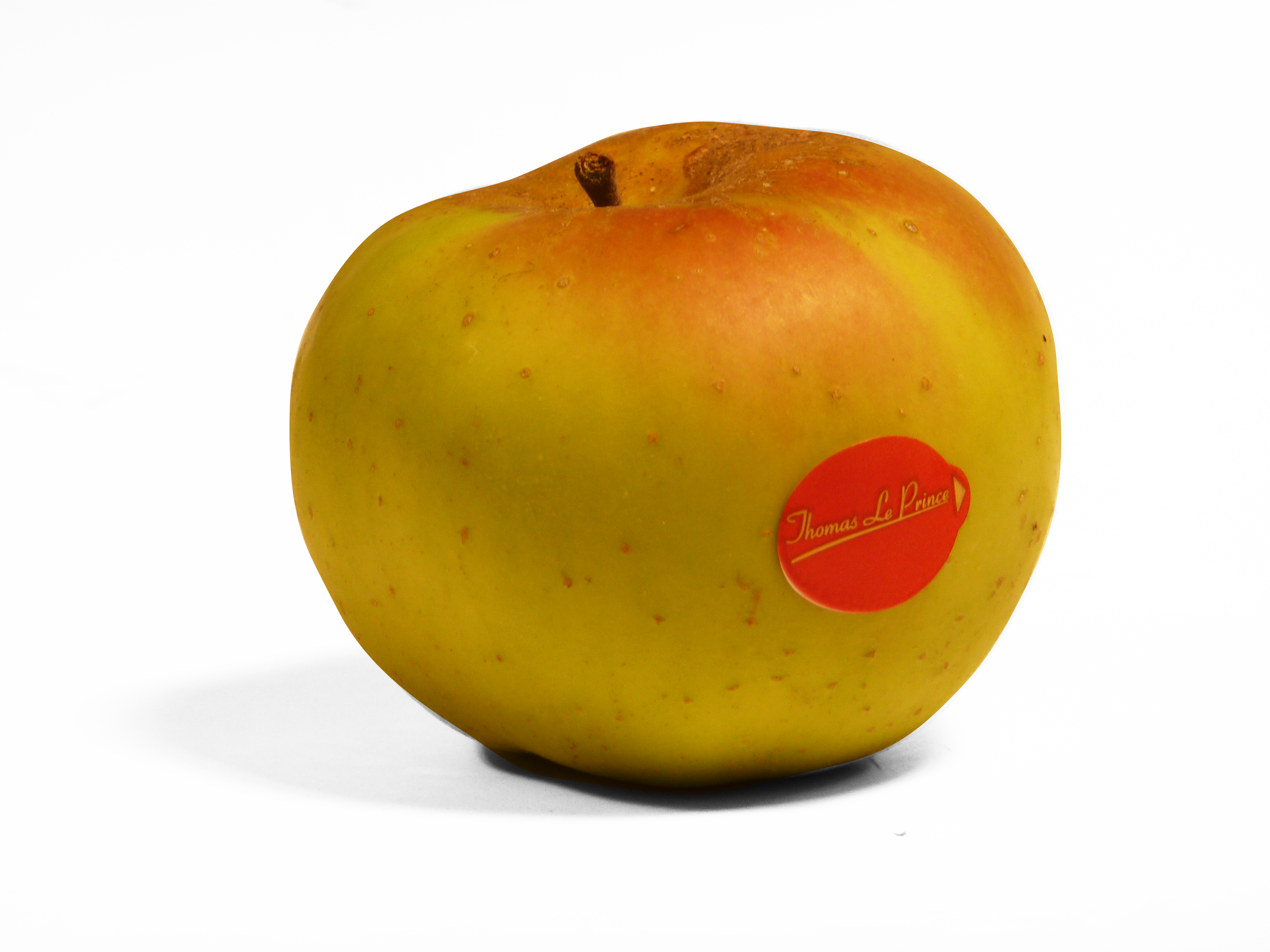 Canada blanche production en savoie par le producteur thomas le prince (Vallières)